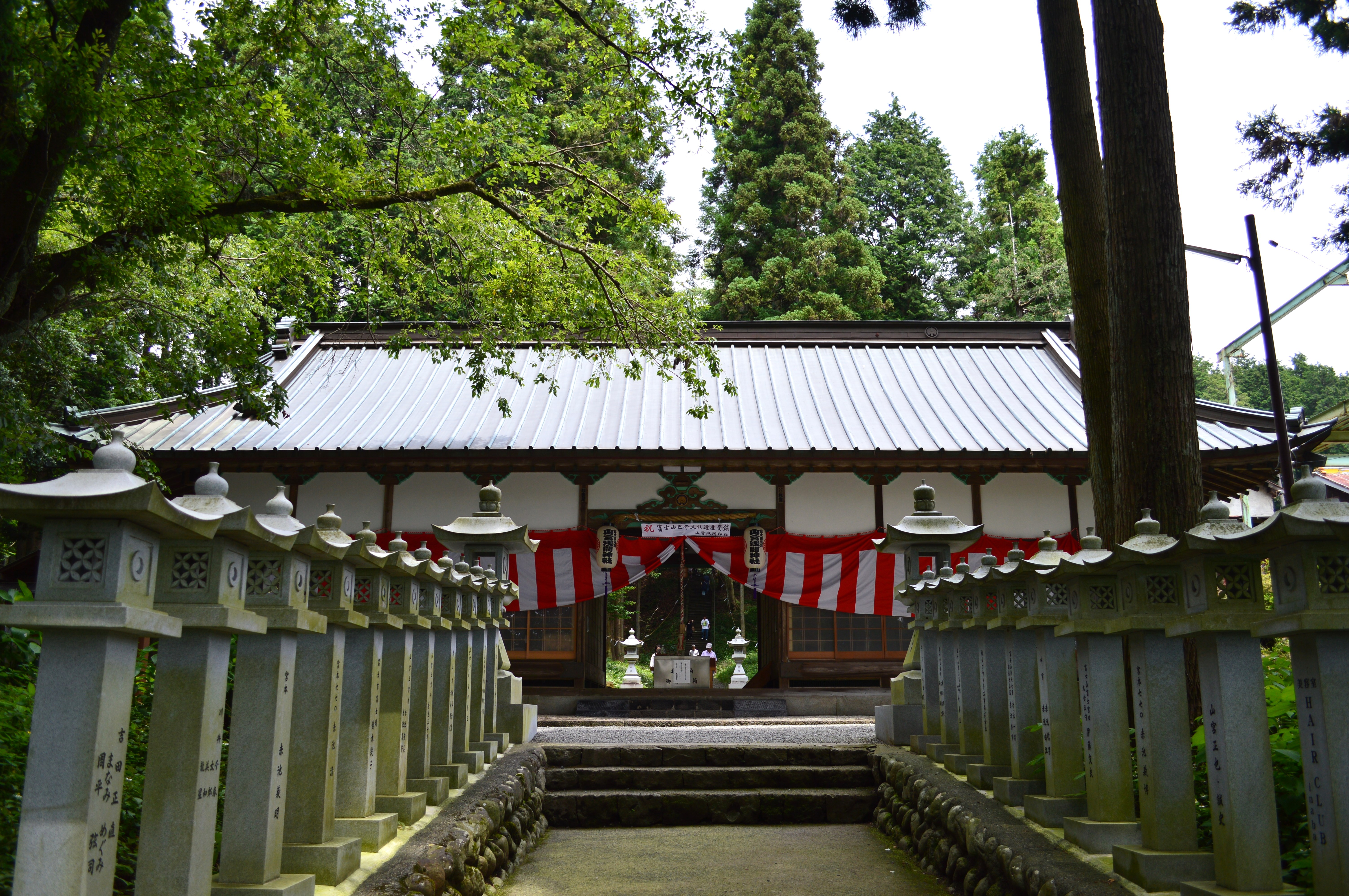 山宮浅間神社 拝殿